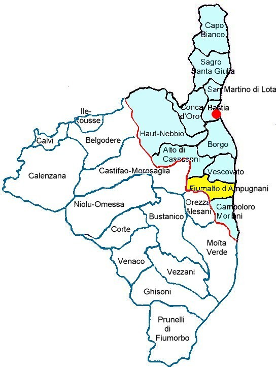 Localisation du canton de Fiumalto-d'Ampugnani, Castagniccia, Haute-Corse